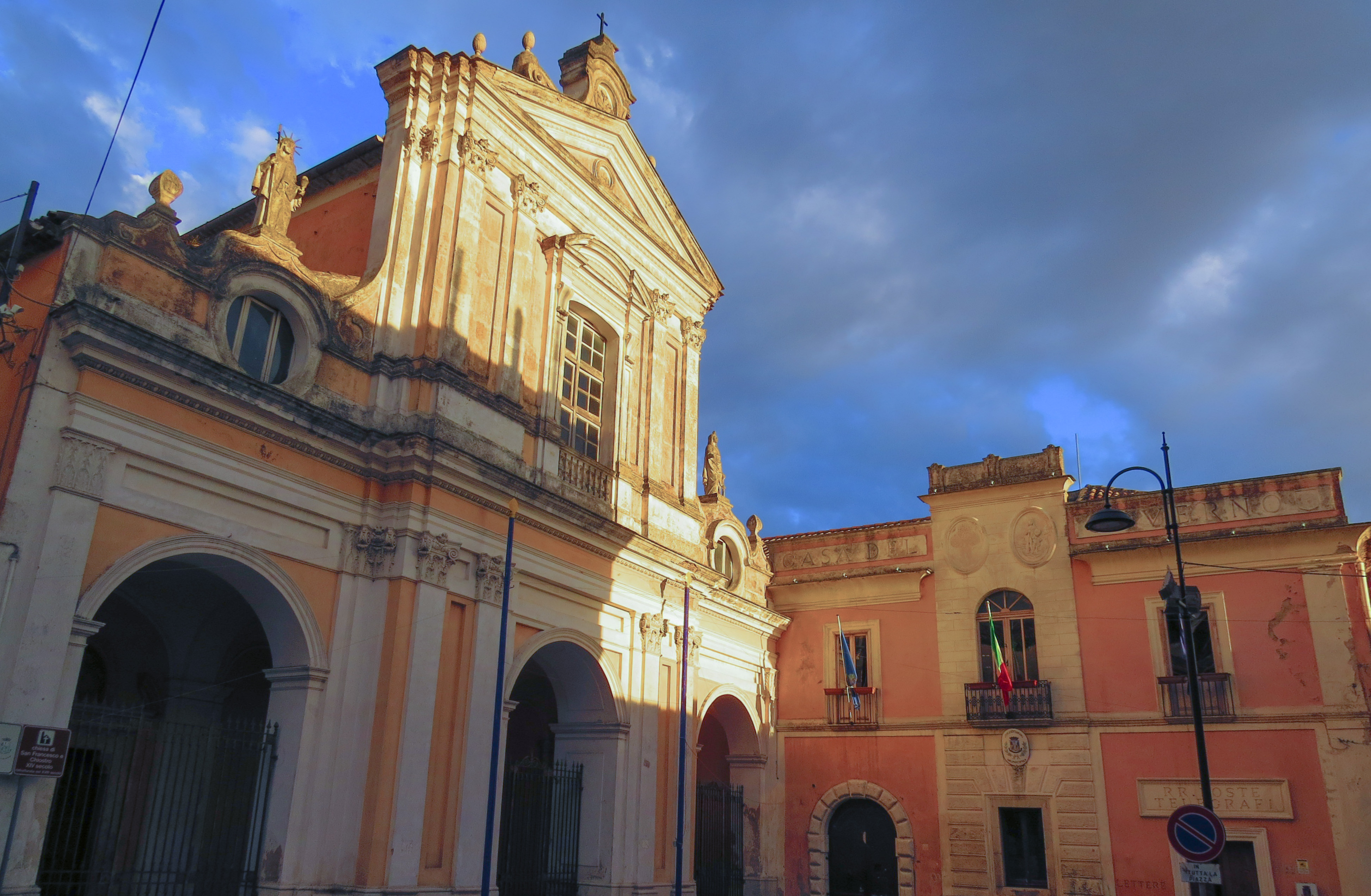 La chiesa conventuale di San Francesco a Montesarchio (BN)